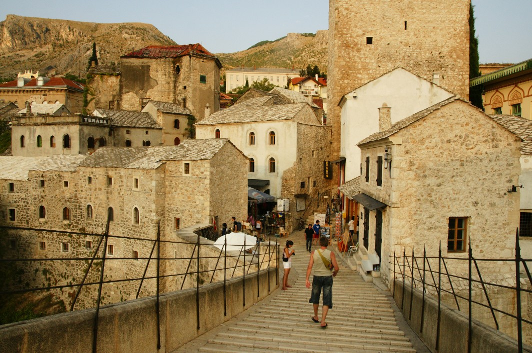 Le pont de Mostar reconstruit en Juillet 2009